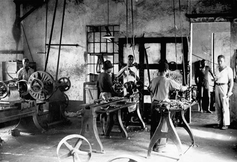 Kamerun, Palmölwerk Bota, Werkstatt